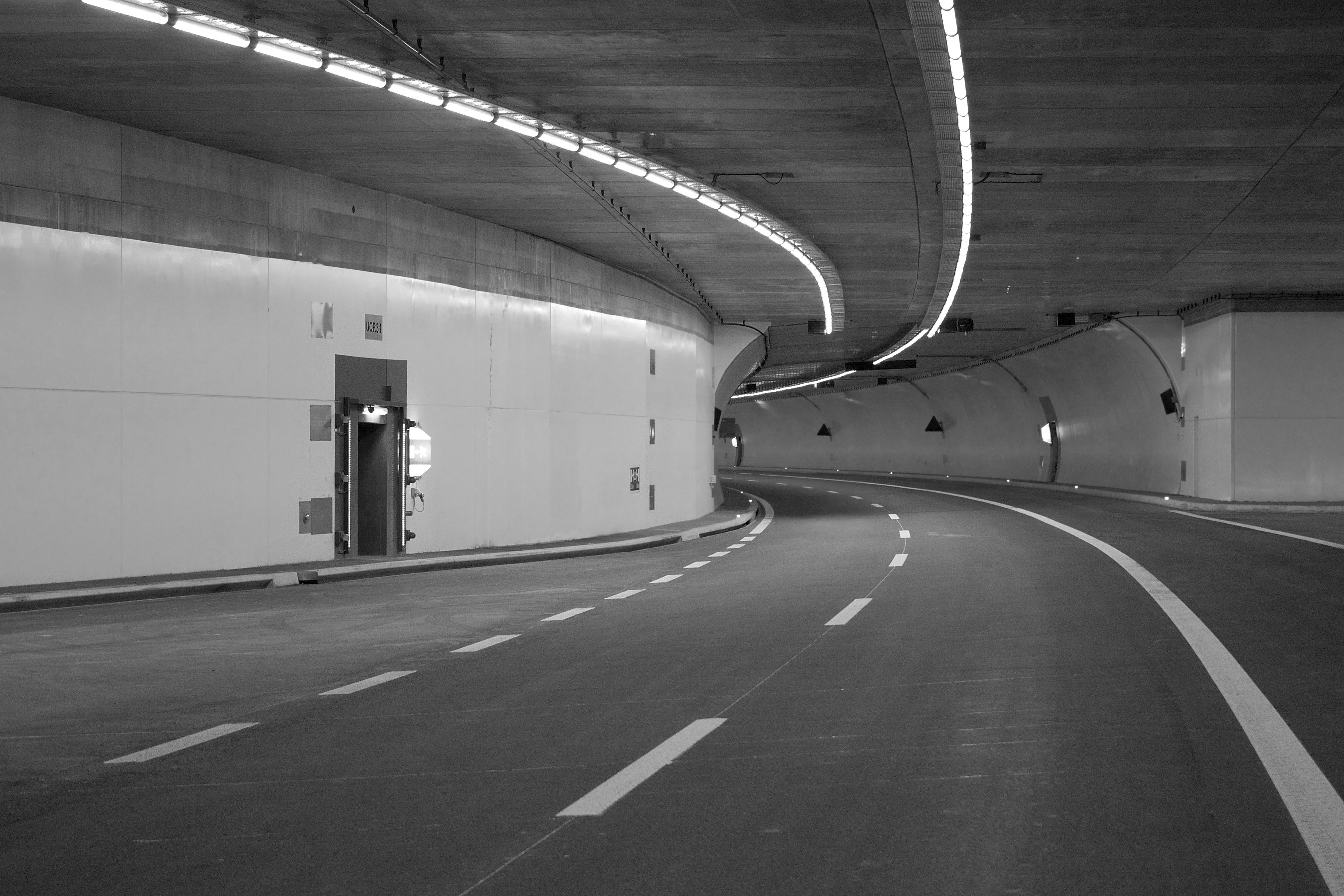 Der Islisbergtunnel auf der Höhe der Lüftungszentrale. Aufnahme vor der Eröffnung des Betriebs